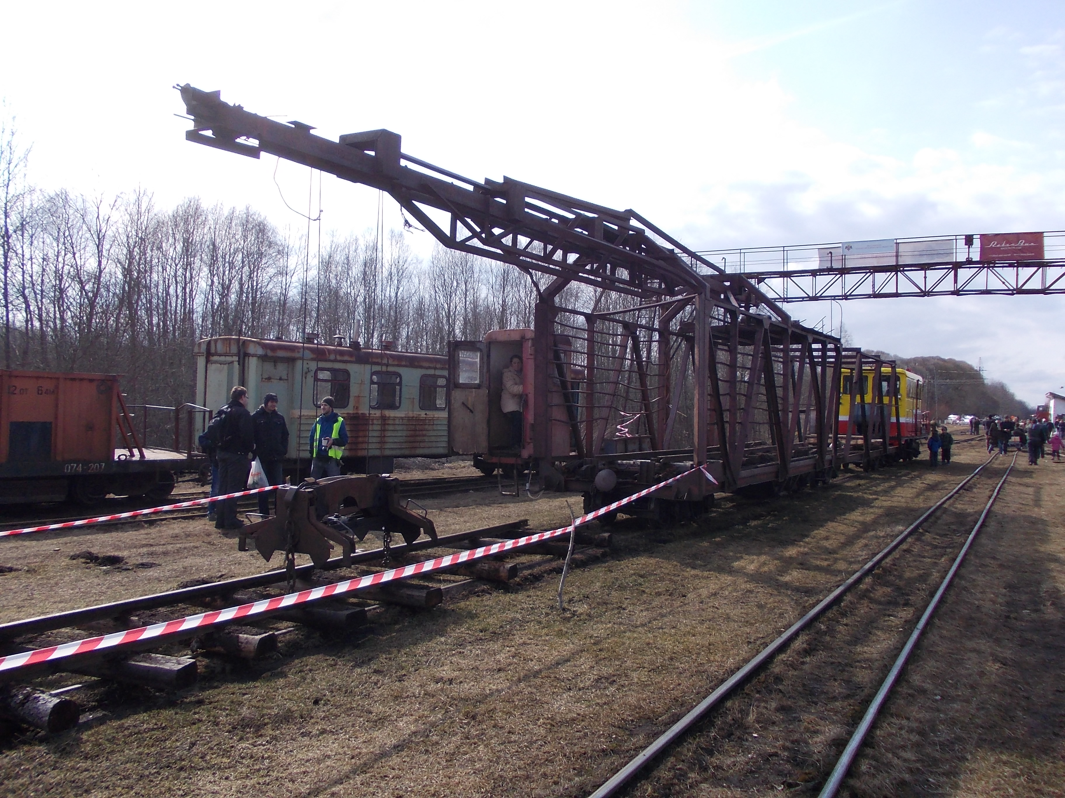 Демонстрационная работа путеукладчика ППР2МА на Тёсовской УЖД в апреле 2015 года.